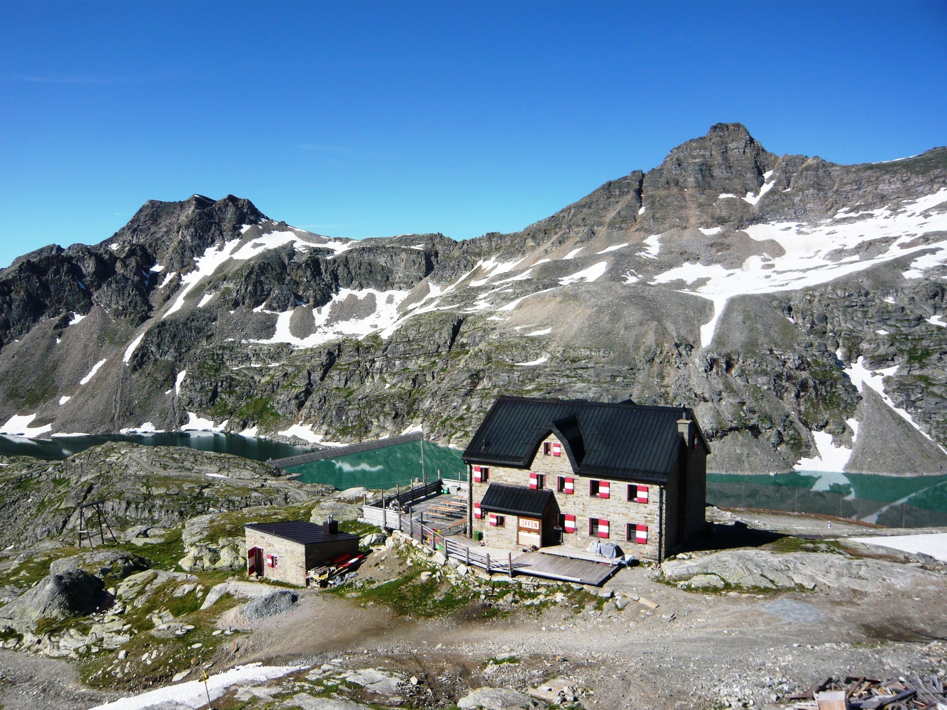 Duisburger Hütte (2572m) in der Goldberggruppe/Kärnten im Mölltaler Gletscher-Skigebiet